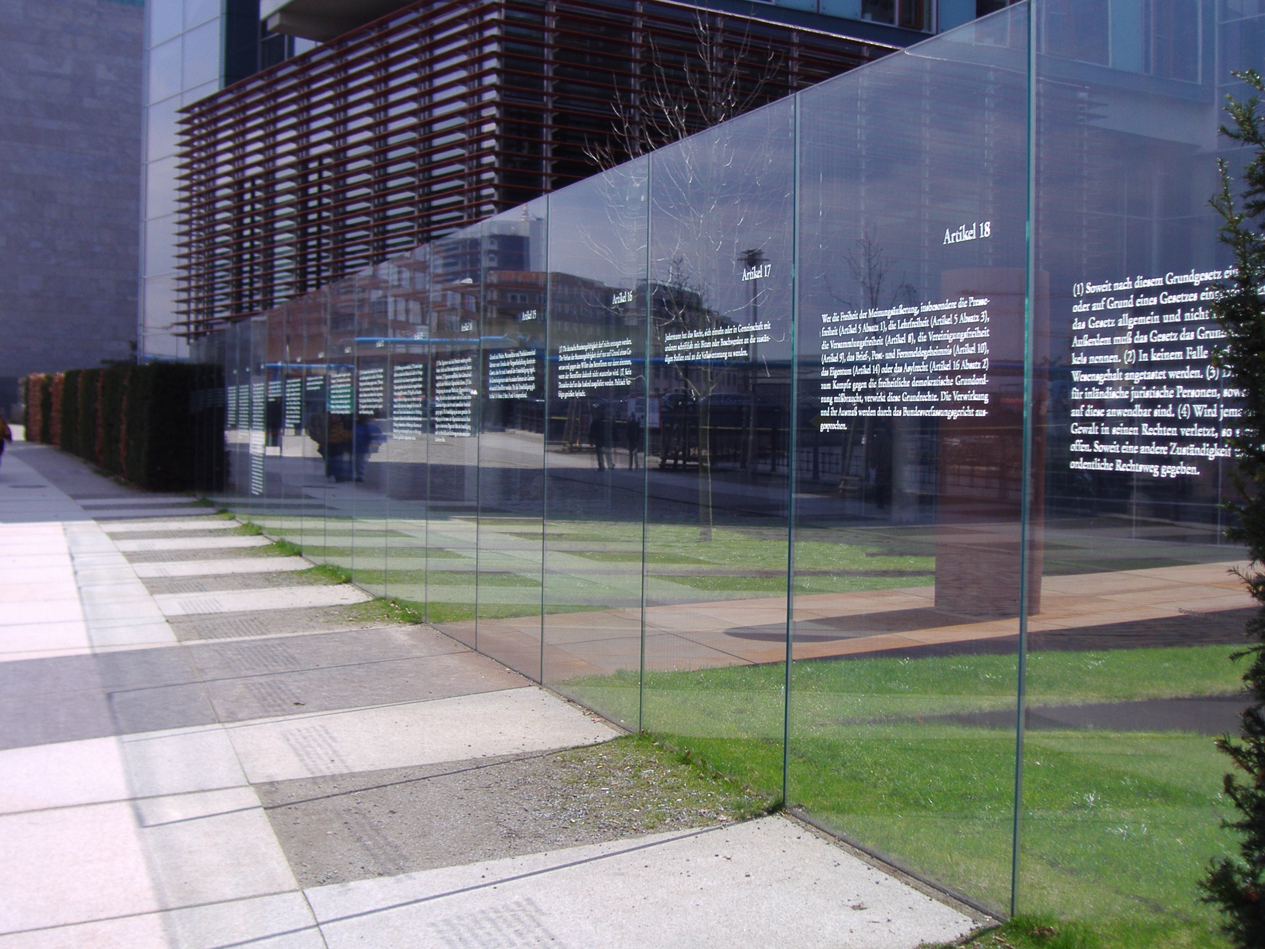 Jakob-Kaiser-Haus; artwork: 19 Grundgesetz-Artikel by Dani Karavan